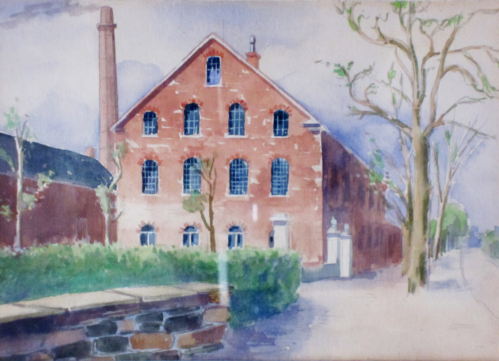 Fabrik "August Müller & Co" in Möllenkotten (erbaut 1857 durch August Müller). Kolorierte Zeichnung des späten 19. Jhs. Die Fabrik für "Novitäten und Modewaaren" arbeitete mit Dampfbetrieb (s. Schlot und Heizerhaus links). Rechts im Bild die frühere Ostenstraße, heutige Hauptstraße, Blick Richtung Norden/Gevelsberg etwa von der heutigen Kreuzung Hauptstraße-Kaiserstraße aus. Das Fabrikgebäude wurde im 2. Weltkrieg zerstört, die Reste um 1950 abgerissen. Die heutige Bebauung am gleichen Ort ist Hauptstraße 159/161.